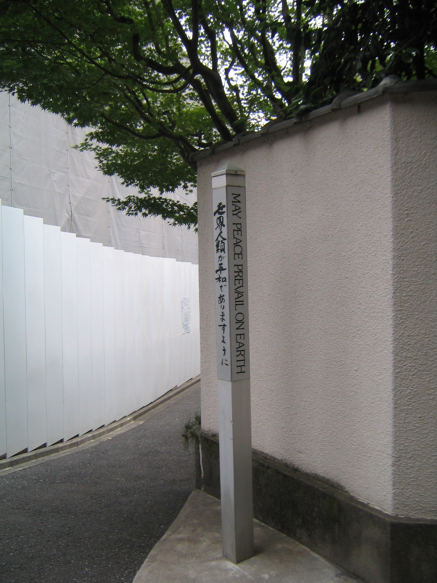 ピースポール（東京都港区麻布にて撮影）